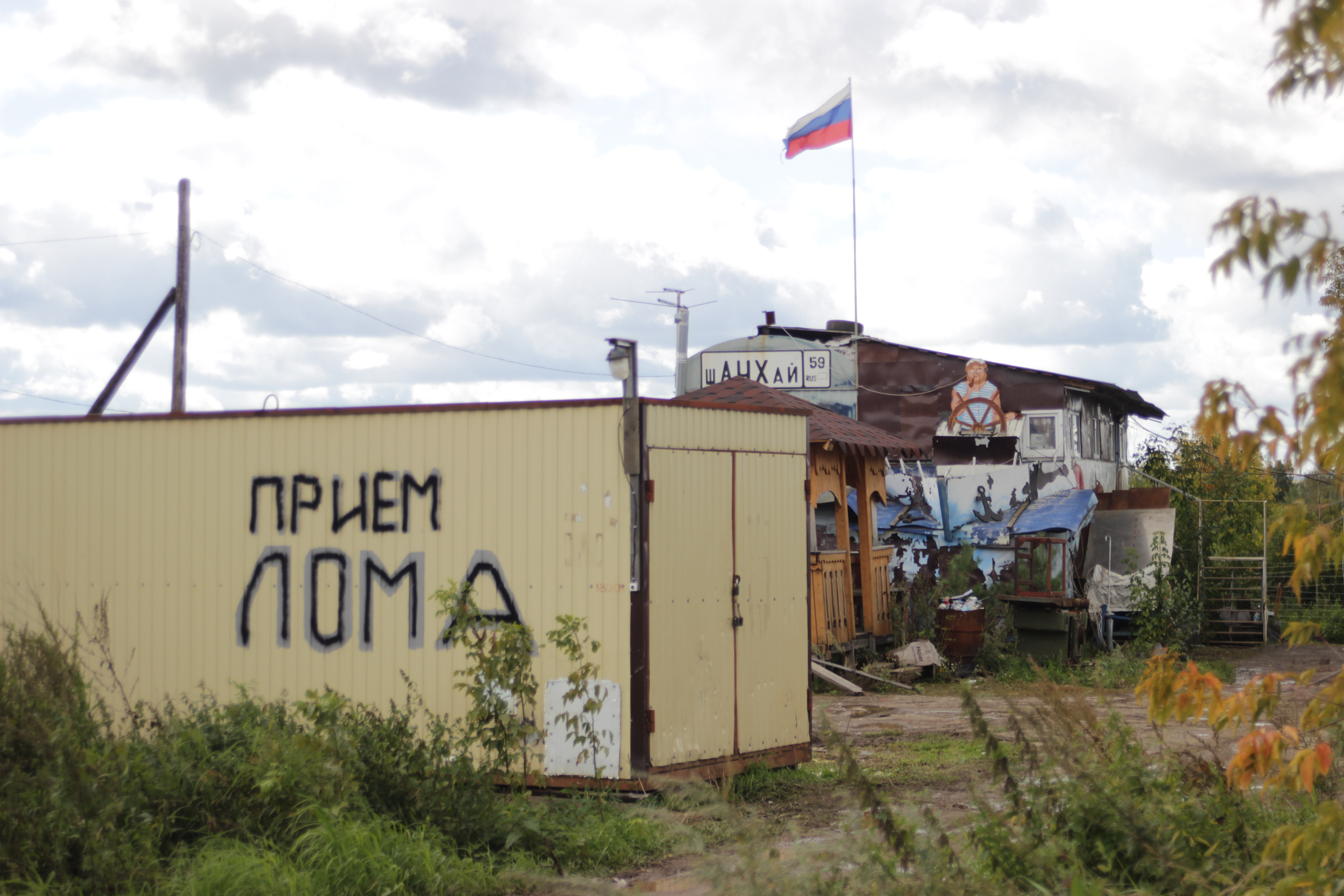 Пункт приема металла